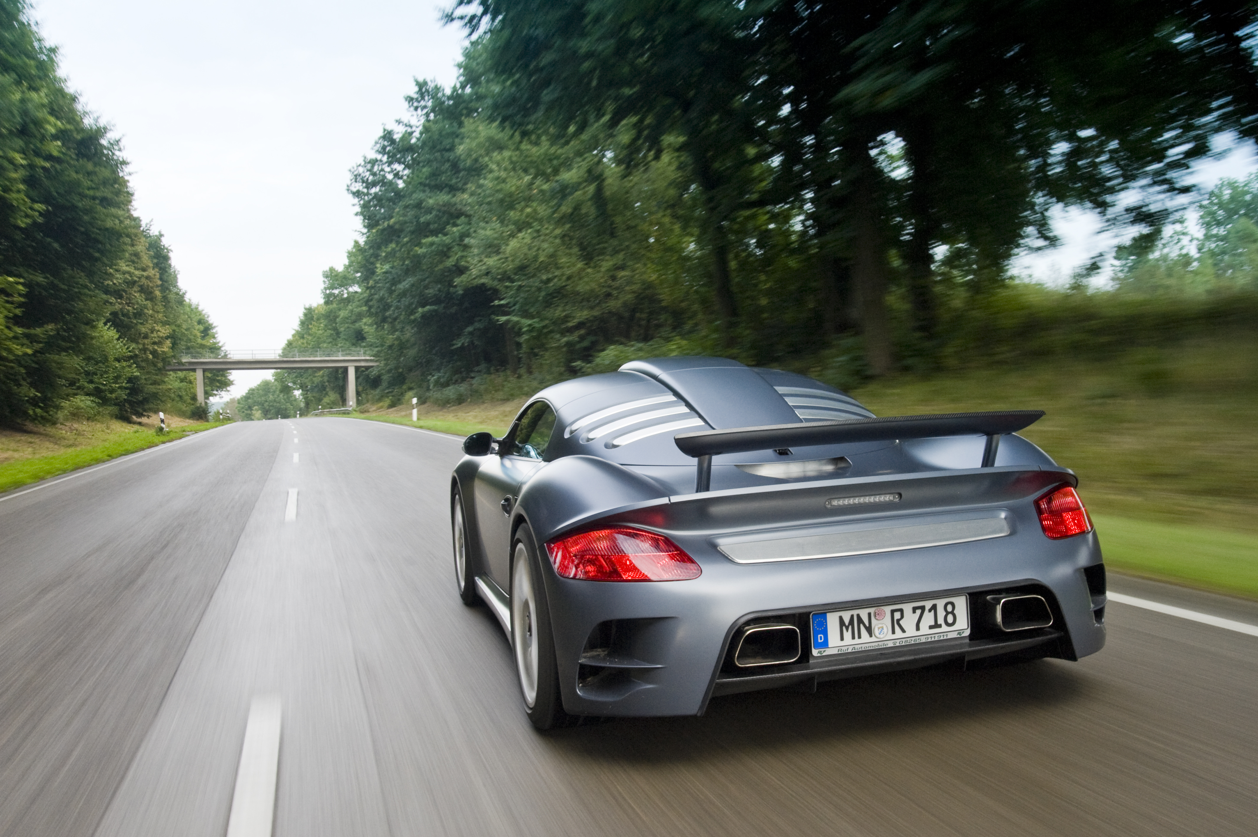 RUF CTR 3 Bild von Antony Fraser